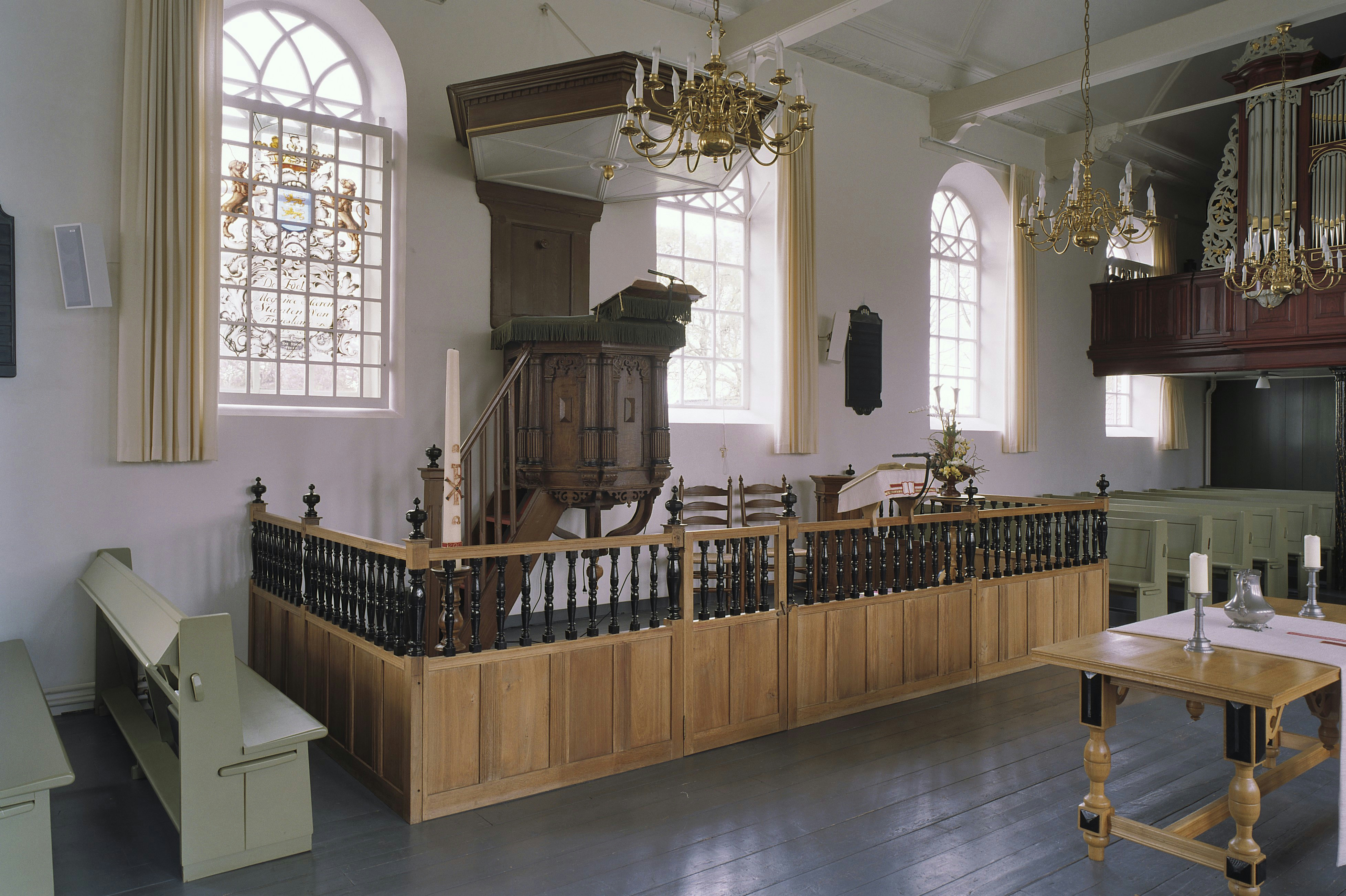 Nederlands Hervormde Kerk: Interieur, preekstoel met doophek hier om heen